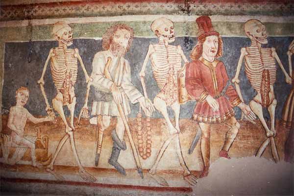 Hrastovlje. Detail fresky. (autor Bibliofil)